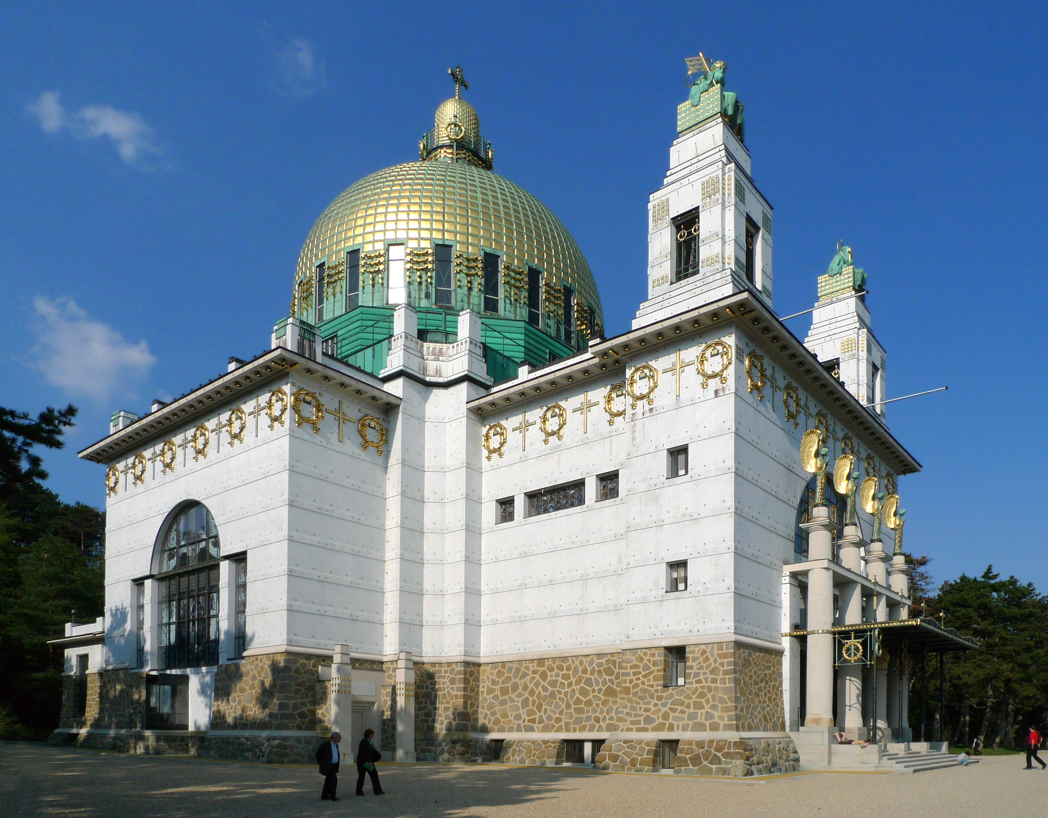 Kirche am steinhof entzerrt